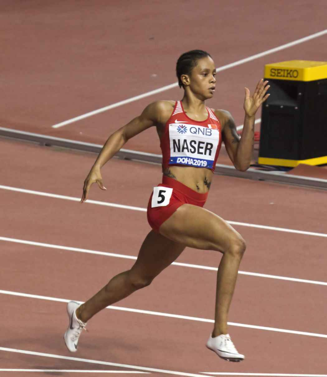 DOH70118 400m women final naser